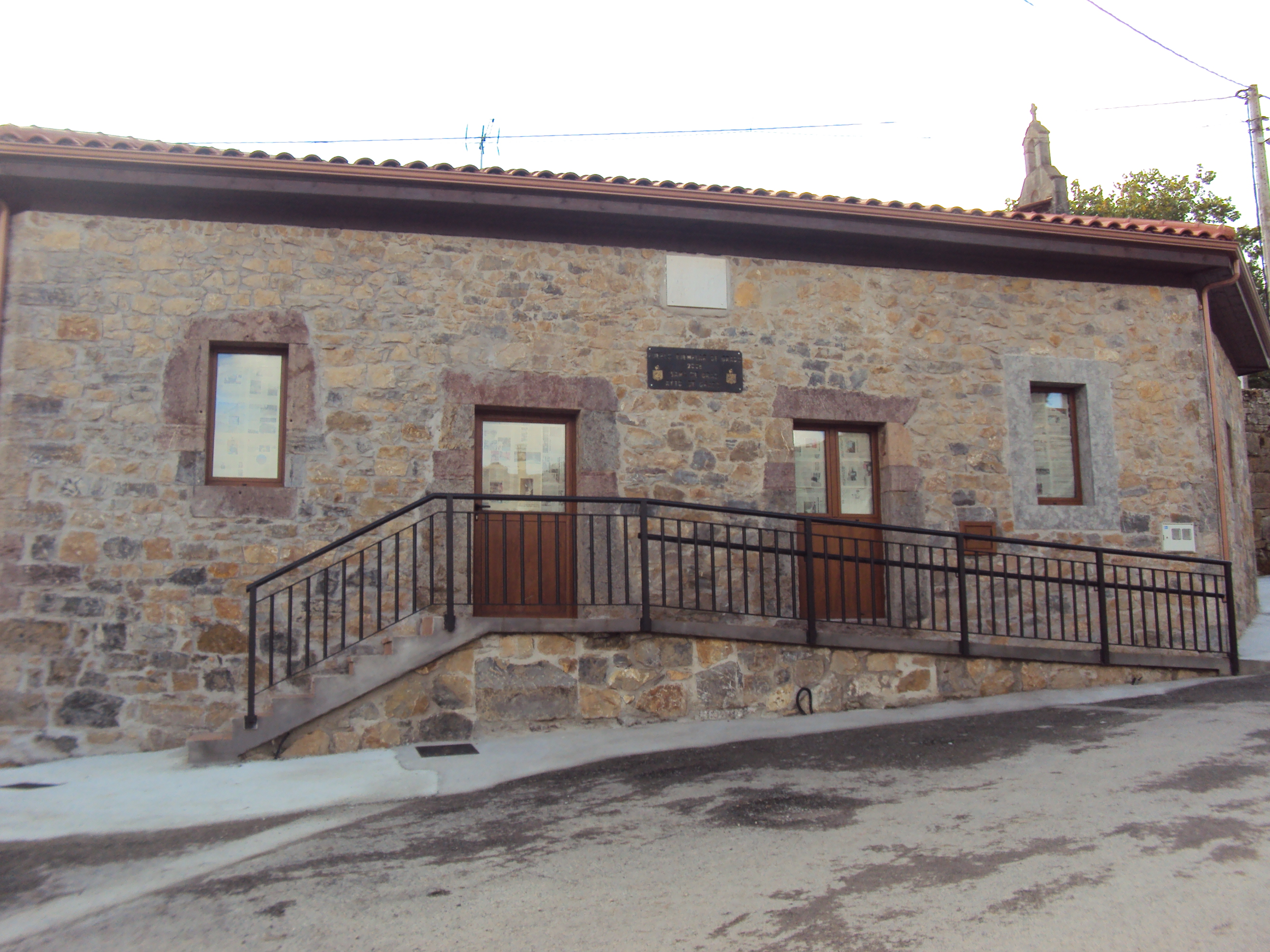 Escuela María del Carmen Arias de Velasco, en Sama de Grado (Asturias)